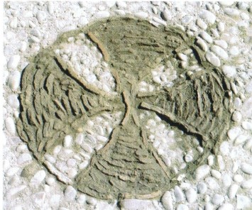 Detalle de la cruz medieval encontrada en Libisosa